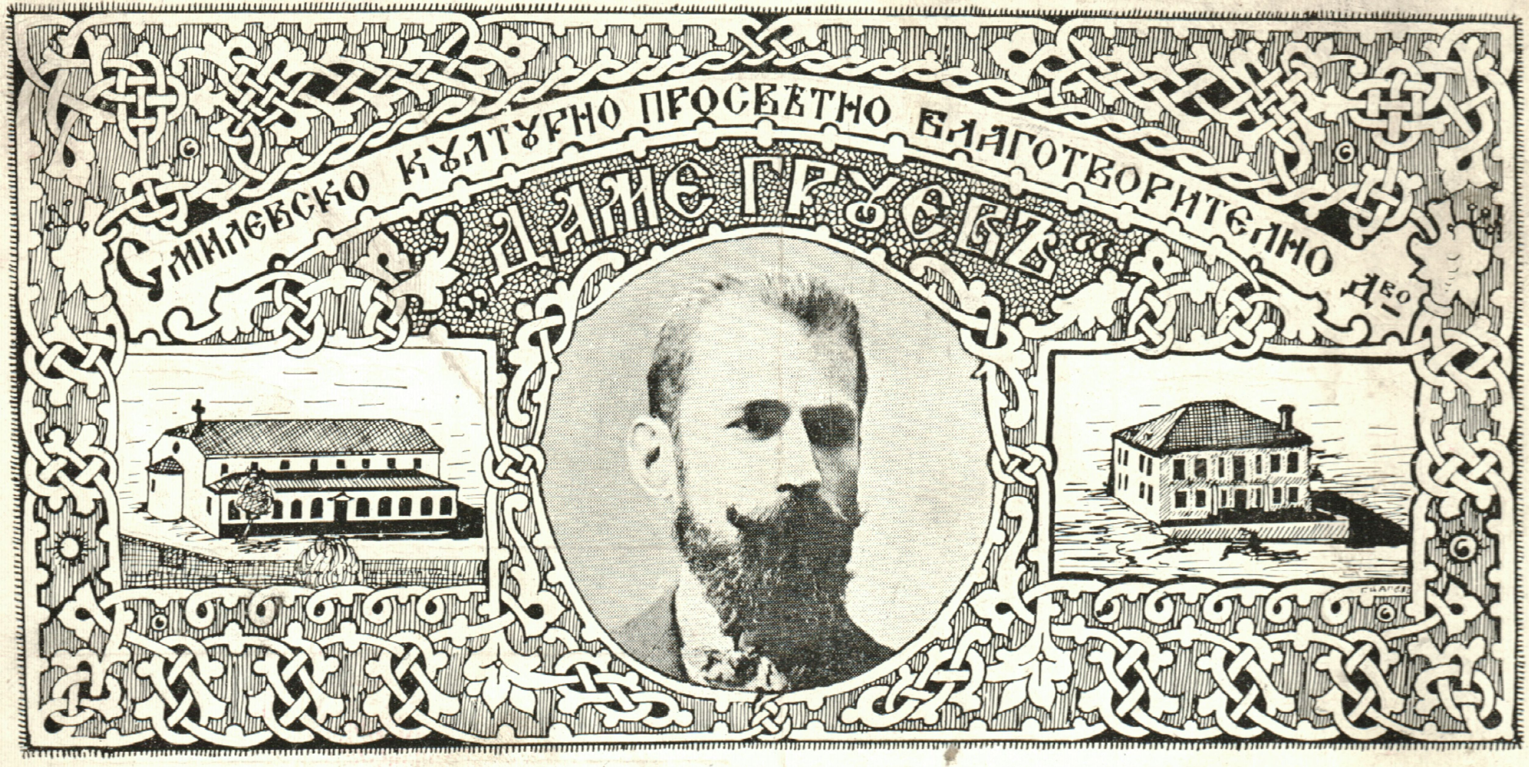 Картичка на Смилевско културно просветно благотворително дружество Даме Груев